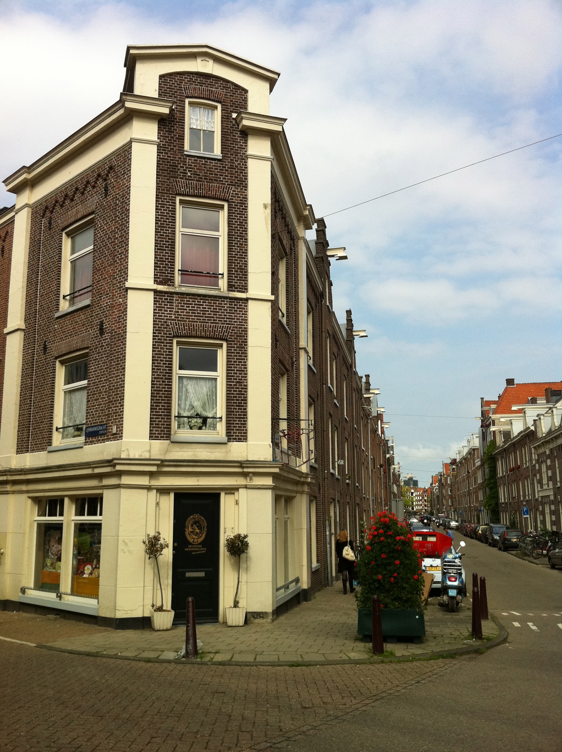 Amsterdam, Jordaan. Hamerwoningen hoek Willemsstraat-Lijnbaansgracht. De hoek Lijnbaansgracht-Willemsstraat, met sigarenmagazijn 't Hoekje, maakt deel uit van een aanbesteding uit 1871 van 42 woningen, voornamelijk rug-aan-rugwoningen, aan de Lijnbaansgracht 23-27 tot aan Willemsstraat 224. Stilistisch sluit dit deel nauw aan op Willemsstraat 198-222, met gelijkvormige trapgevels en sparvelden, dat al tussen 1862 en 1864 gebouwd moet zijn.